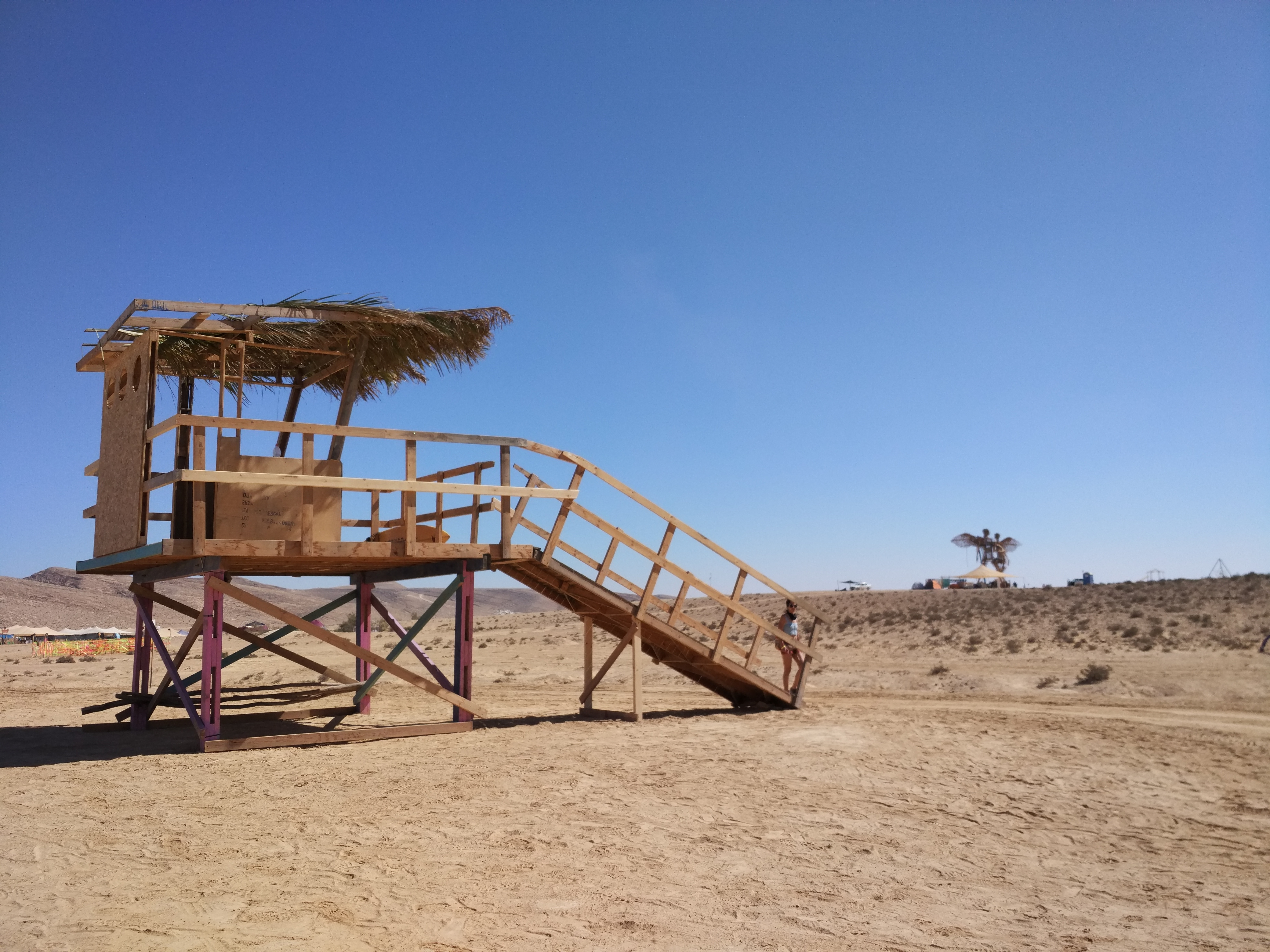 סוכת מציל במדבר, מיצג לדוגמא. מידברן 2017